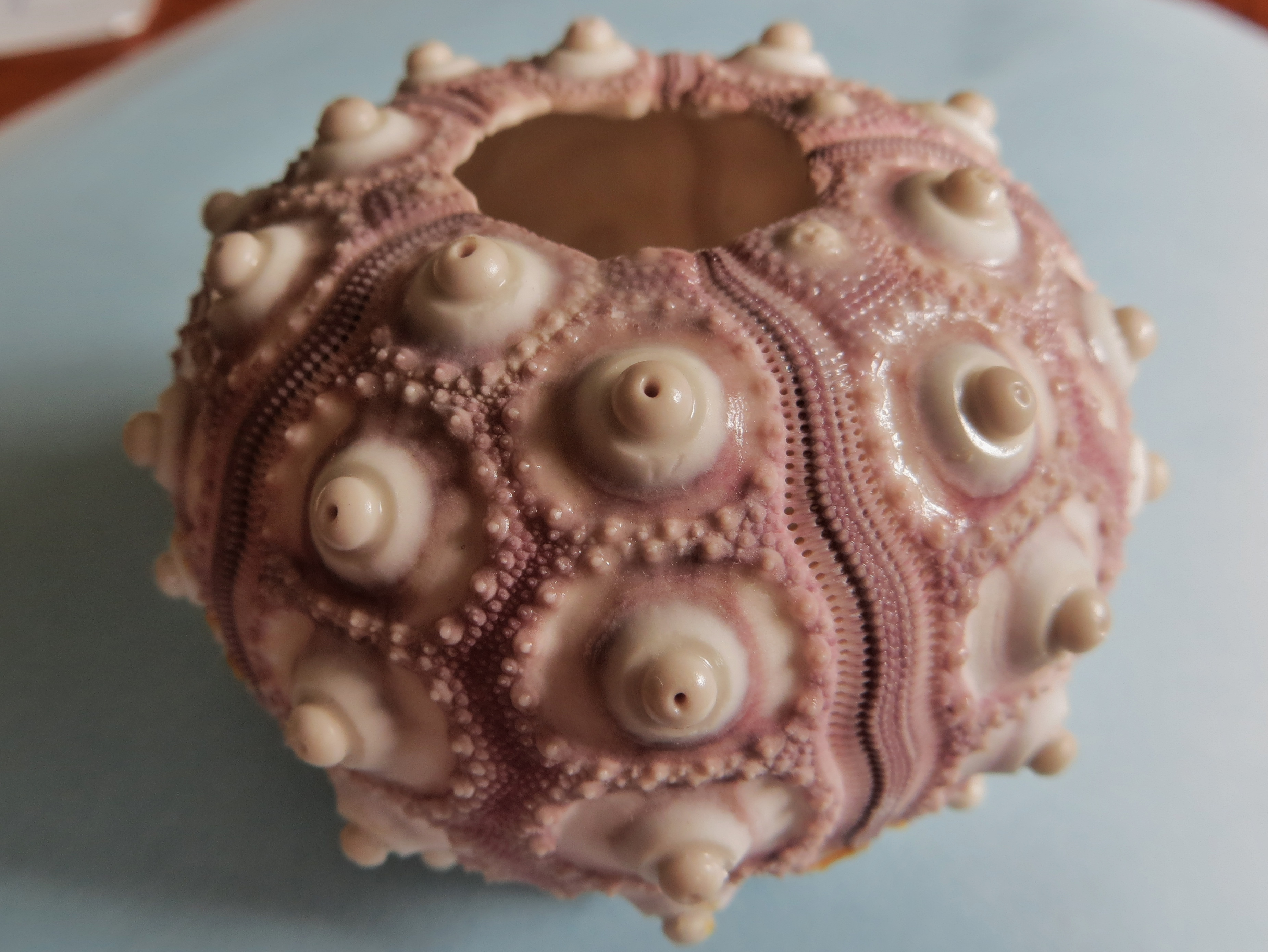 Le test (coquille) d'un oursin impérial Phyllacanthus imperialis (Nouvelle-Calédonie).